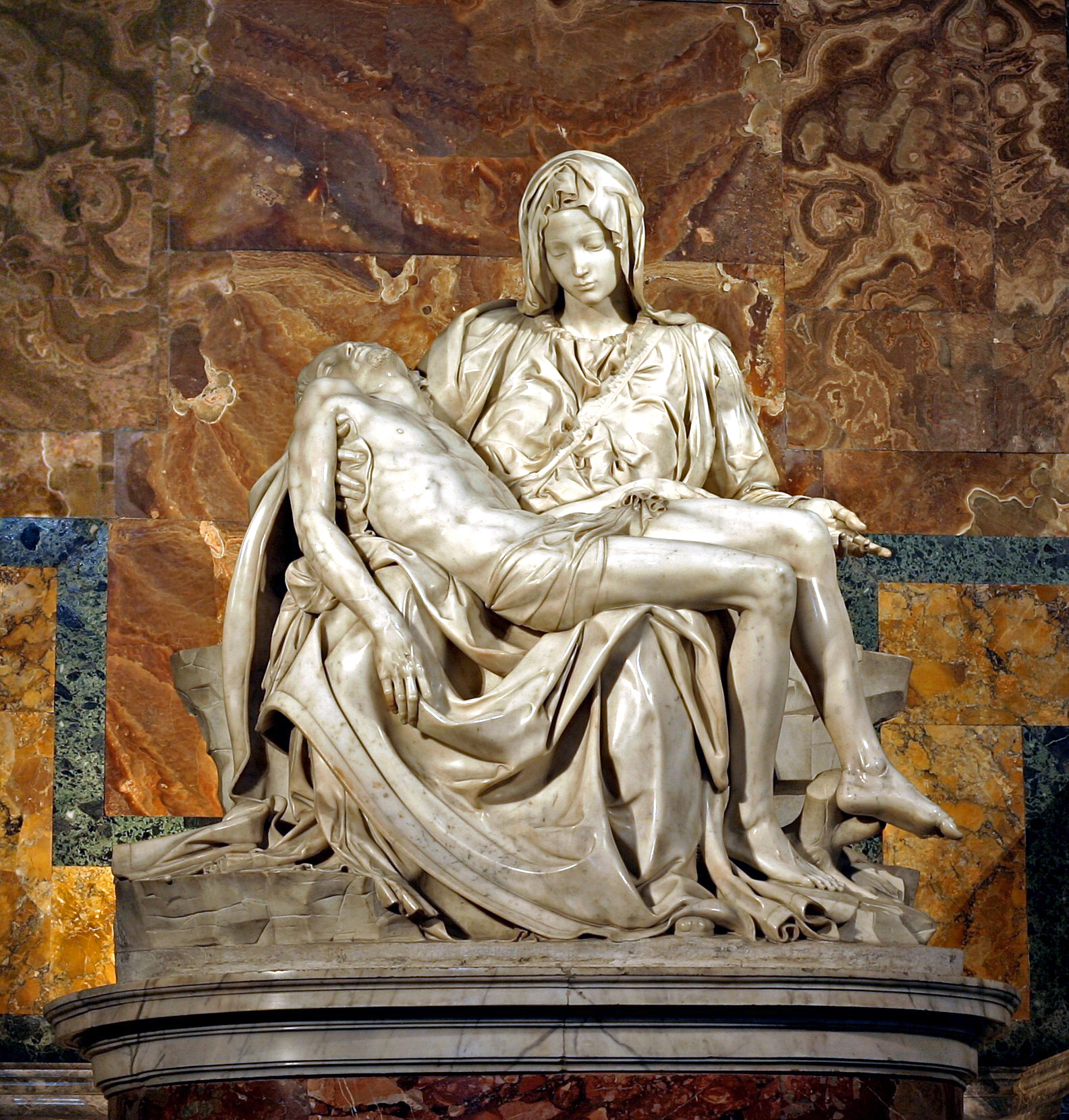 Dem Michelangelo seng Pieta Source:ex-Commons, Foto vum Stanislav Traykov, verschafft vum Benotzer:Cornischong